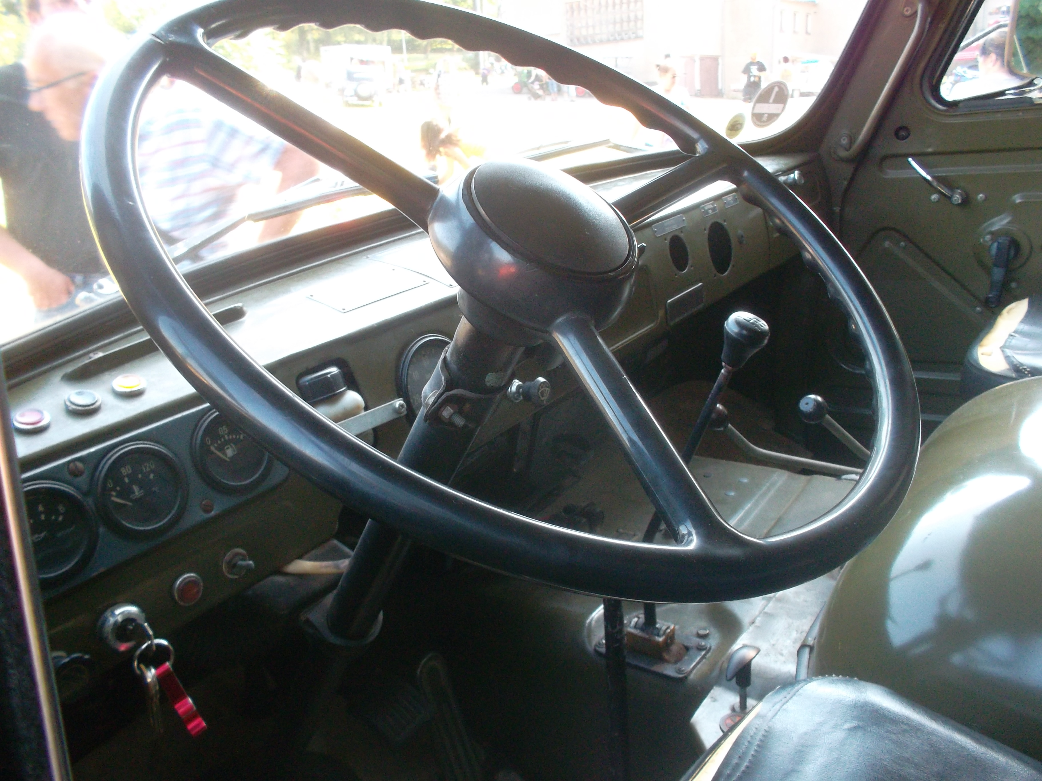 Lenkrad des Uljanowski Awtomobilny Sawod 452 (Baujahr 1979-1985)